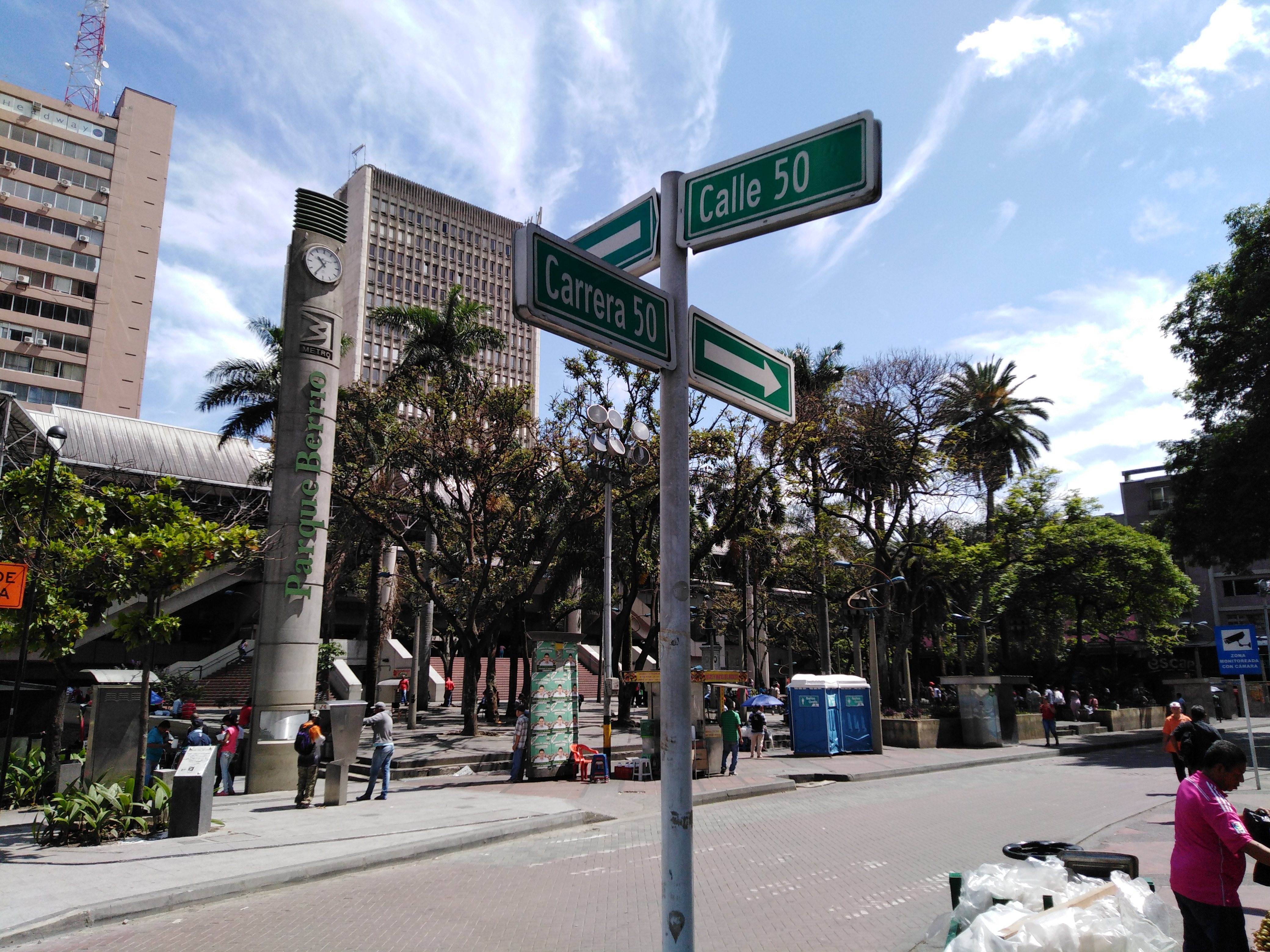 Croisement de la calle 50 et de la carrera 50, Medellín.